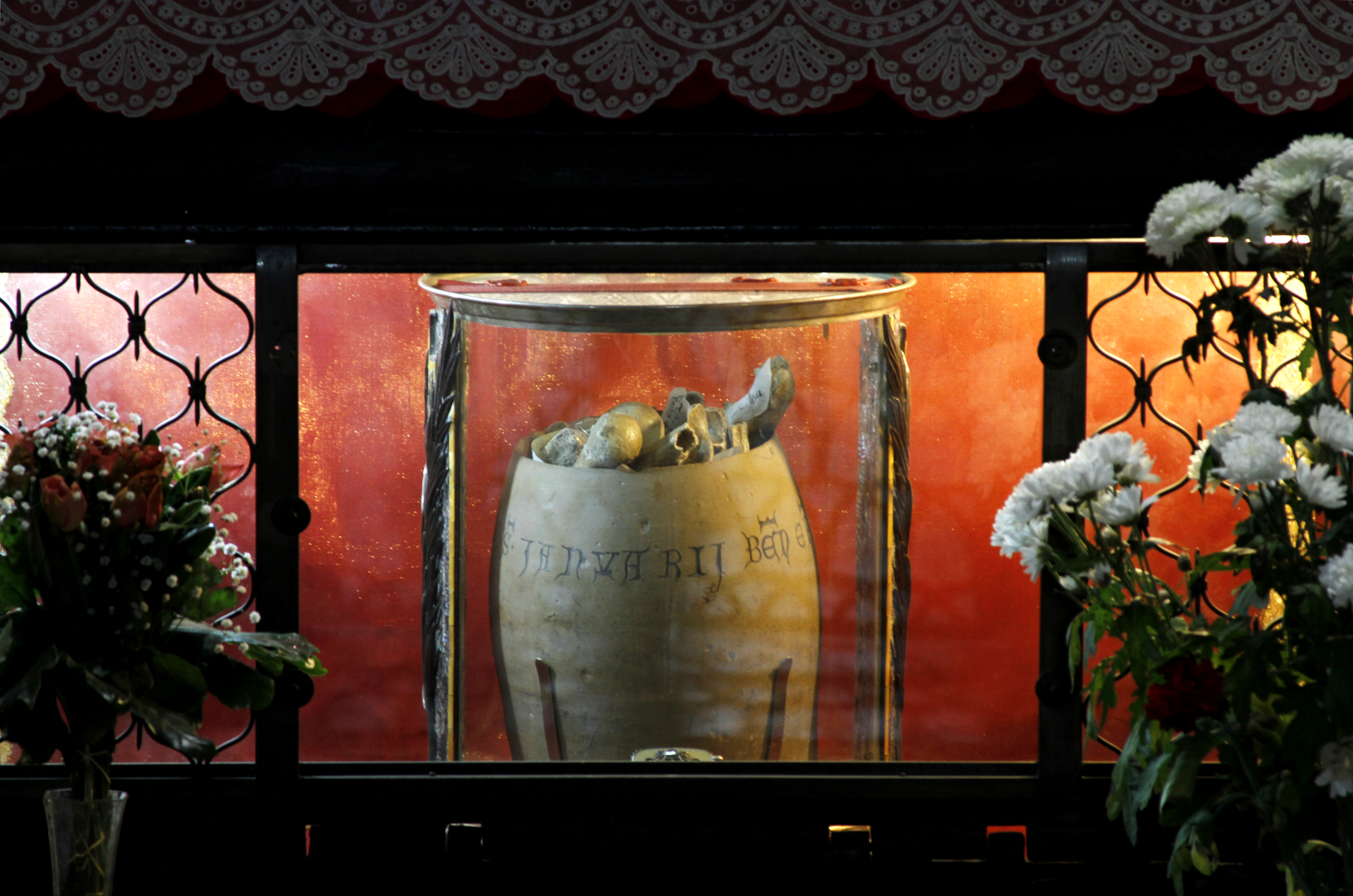 Cappella del Succorpo, Catedral de Nápoles